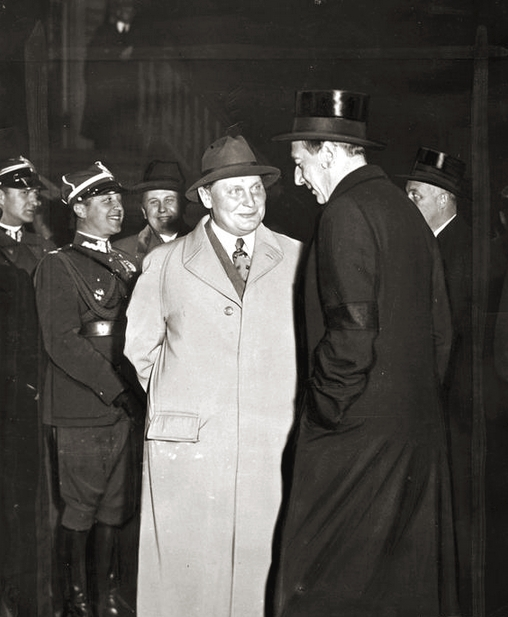 Józef Beck i Hermann Goering podczas jego wizyty w Warszawie w 1937 r., zdjęcie z tygodnika Światowid.